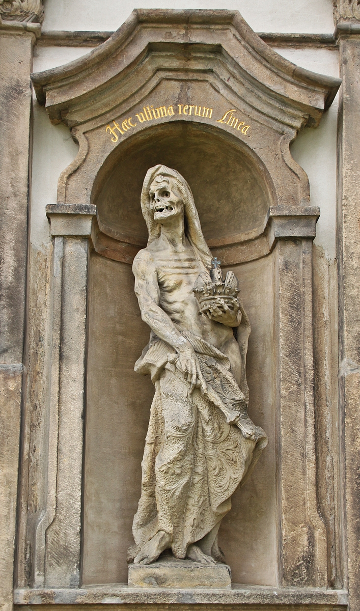 Hainewalde: Statue des Todes als halbverwester Leichnam mit Krone und Zepter und der Inschrift "Haec ultima rerum linea" ("Dies ist die äußerste Grenze der Dinge") an der Kanitz-Kyawschen Gruft. Die 1715 erbaute Gruft gilt als bedeutenstes Werk barocker Grabmalkunst der gesamten Oberlausitz. Stifter waren Otto Ludwig von Kanitz (1661-1724) und seine Gemahlin Viktoria Tugendreich geb. von Kyaw (1657-1716). Das Äußere der Gruft ist reich mit Säulen, Wappen und weiterem Beiwerk verziert. Hauptaugenmerkt bilden 17 Sandsteinstauen, von denen je vier an jeder Seite und ein Engel als Freifigur auf dem Dach der Gruft angebracht sind. Die Statuen sind thematisch geordnet und bilden Gegensatzpaare, bei denen je ein irdisches Leiden einer himmlischen Seligkeit gegenübergestellt wird. Besondere Beachtung verdienen die Figuren irdischen Leidens, die sehr realitätsnah dargestellt sind, während die Allegorien himmlischer Glückseligkeit Idealgestalten sind. (Am Kirchberg 6, Denkmal-Nr. 09271033, Sachgesamtheits-Nr. 09303500)